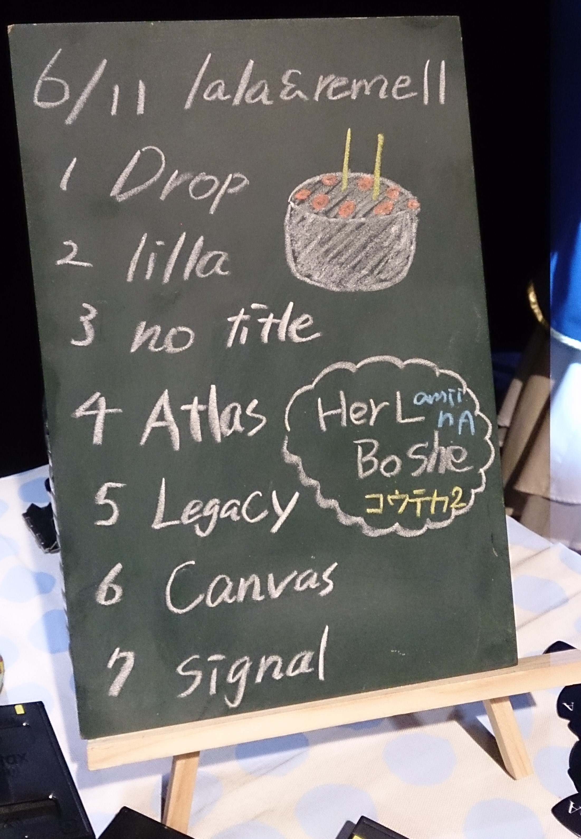 amiinAセトリボード(20160611(1))